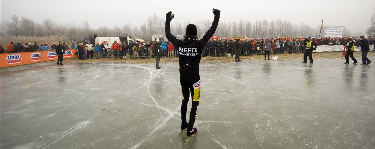 Sjoerd Huisman (Andijk, 19 juni 1986 - 30 December 2013) was een Nederlands skeeleraar en marathonschaatser. Foto genomen na zijn kampioensrace voor het Nederlands kampioenschap marathonschaatsen op natuurijs.